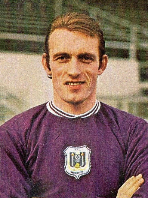 CAMPIONI dello SPORT 1973/74-Figurina n.119- VAN HIMST - BELGIO -CALCIO-Rec